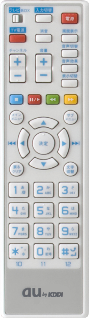 投稿者自身による作品